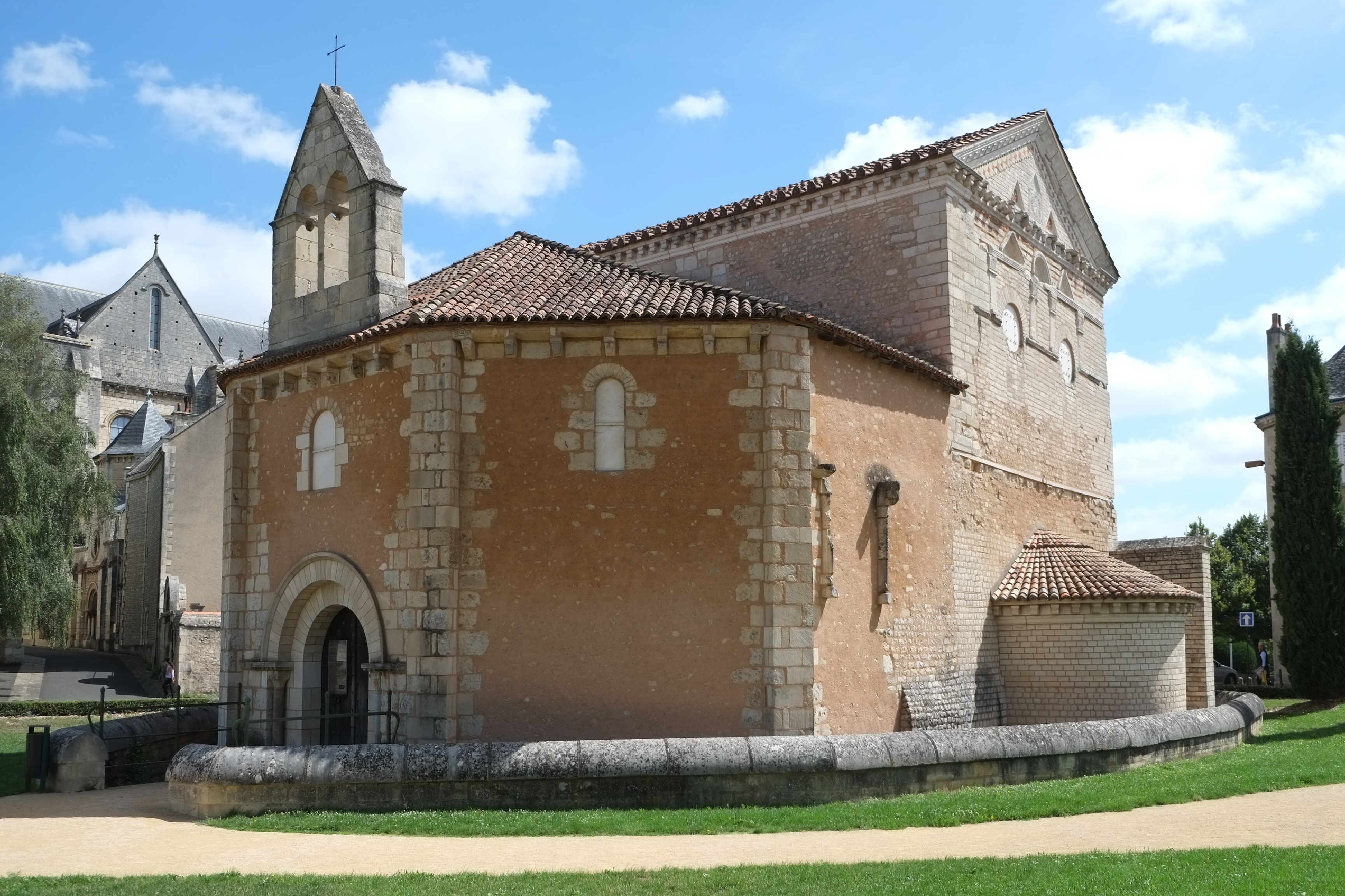 Baptistère Saint-Jean Poitiers Vienne France .